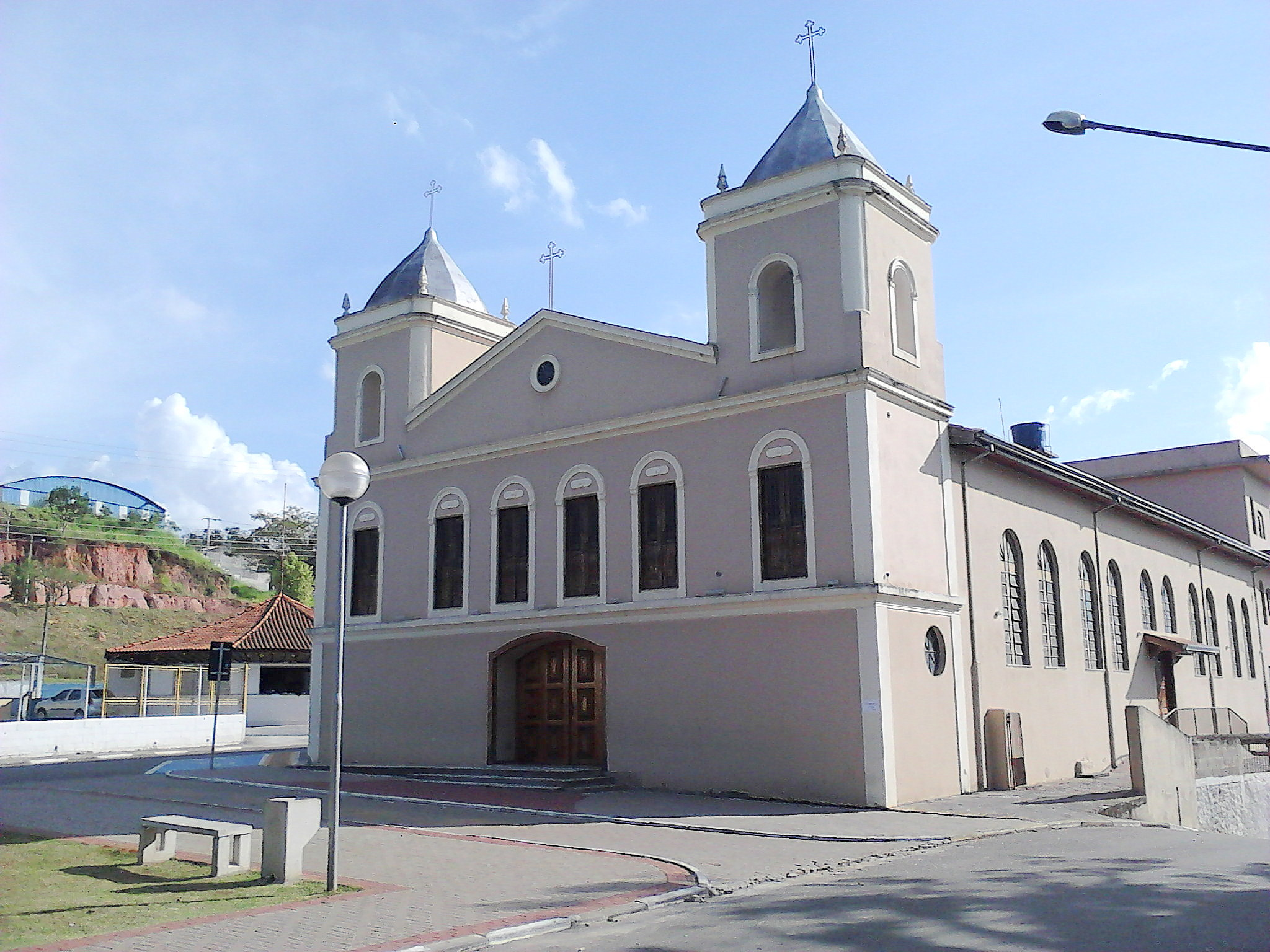 Paróquia de Bom Jesus de Arujá, matriz da cidade. SP, Brasil.